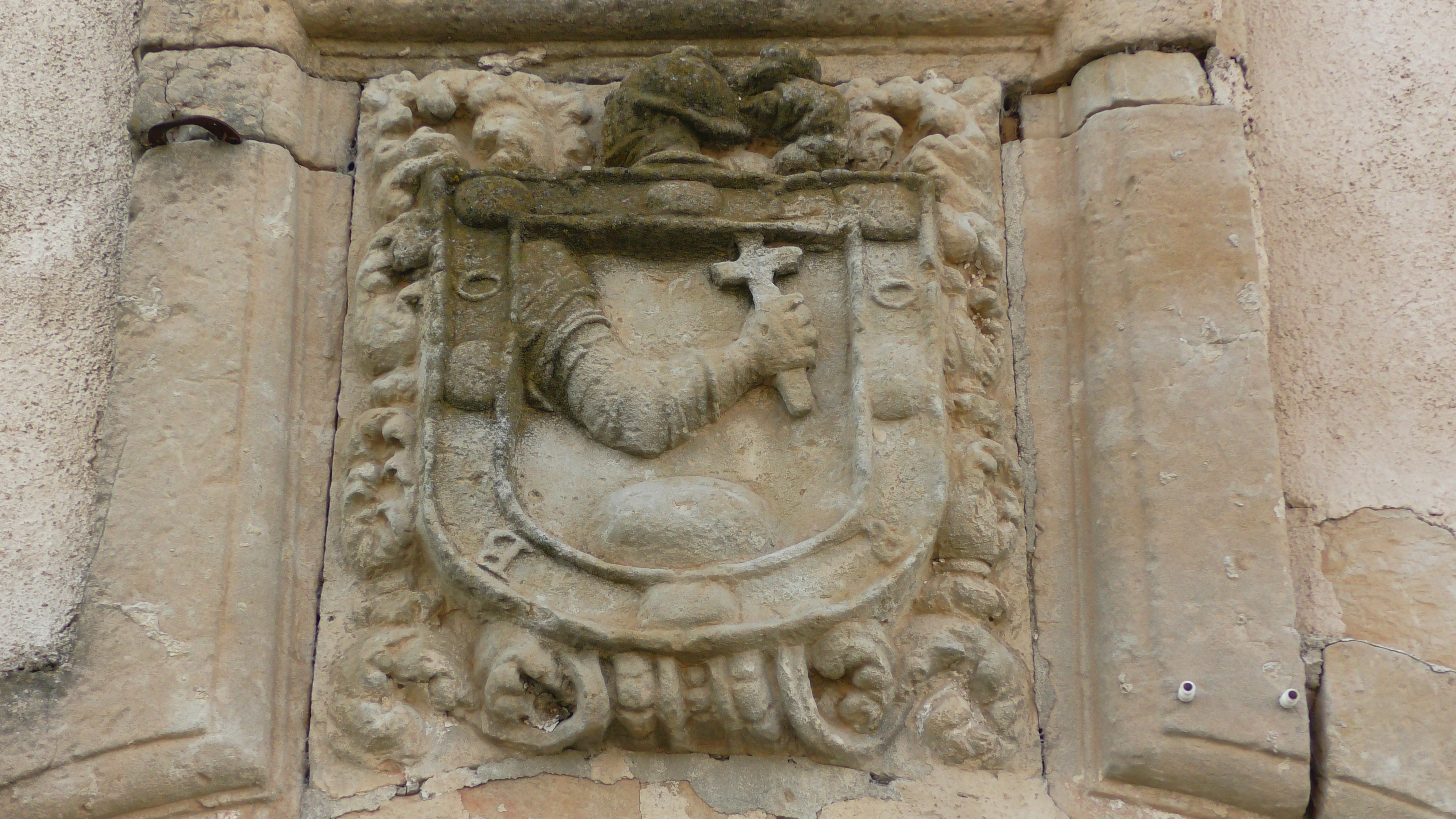 Fuentespreadas